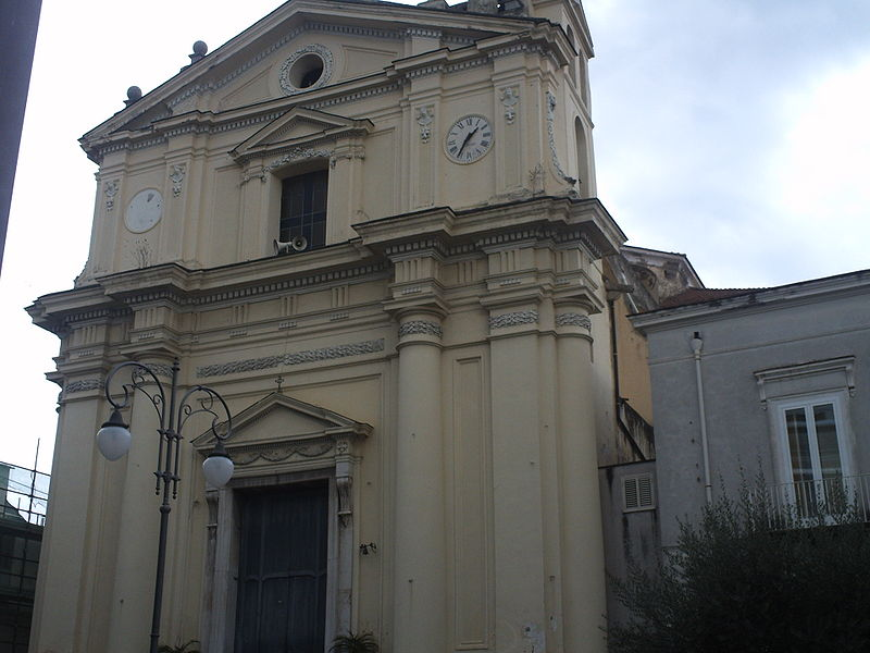 Questa immagine è una foto scattata da me, non è protetta da diritti d'autore e autorizzo chiunque a farne l'uso che vuole.